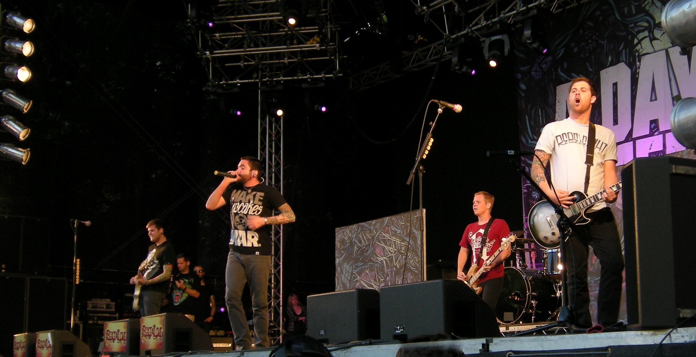 Amerikanska bandet A Day to Remember på Peace and Love i Borlänge 2010